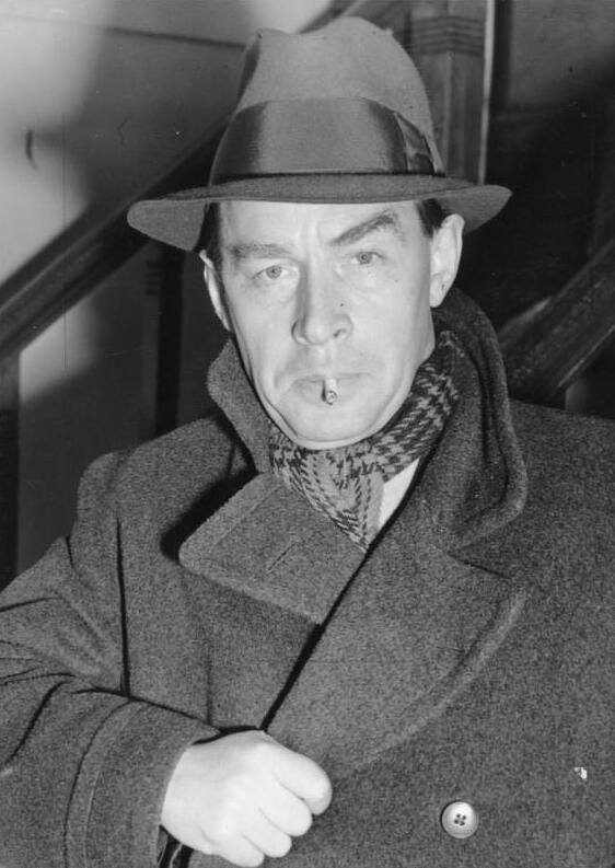 ADN-ZB Erich Maria Remarque, bürgerlich-antifaschistischer Schriftsteller mit gesellschafts-kritisch-pazifistischer Haltung, geboren 22.6.1898 in Osnabrück Remarque übersiedelte 1932 in die Schweiz, 1933 wurden von den Nazis seine Bücher verbrannt und ihm die deutsche Staatsbürgerschaft aberkannt. Er emigrierte 1939 in die USA (New York). Bekannteste Werke: "Im Westen nichts Neues" (1929), "Drei Kameraden" (1938), "Arc de Triomphe" (1946) UBz: Remarque trifft am 23.3.1939 auf der "Queen Mary" in New York ein